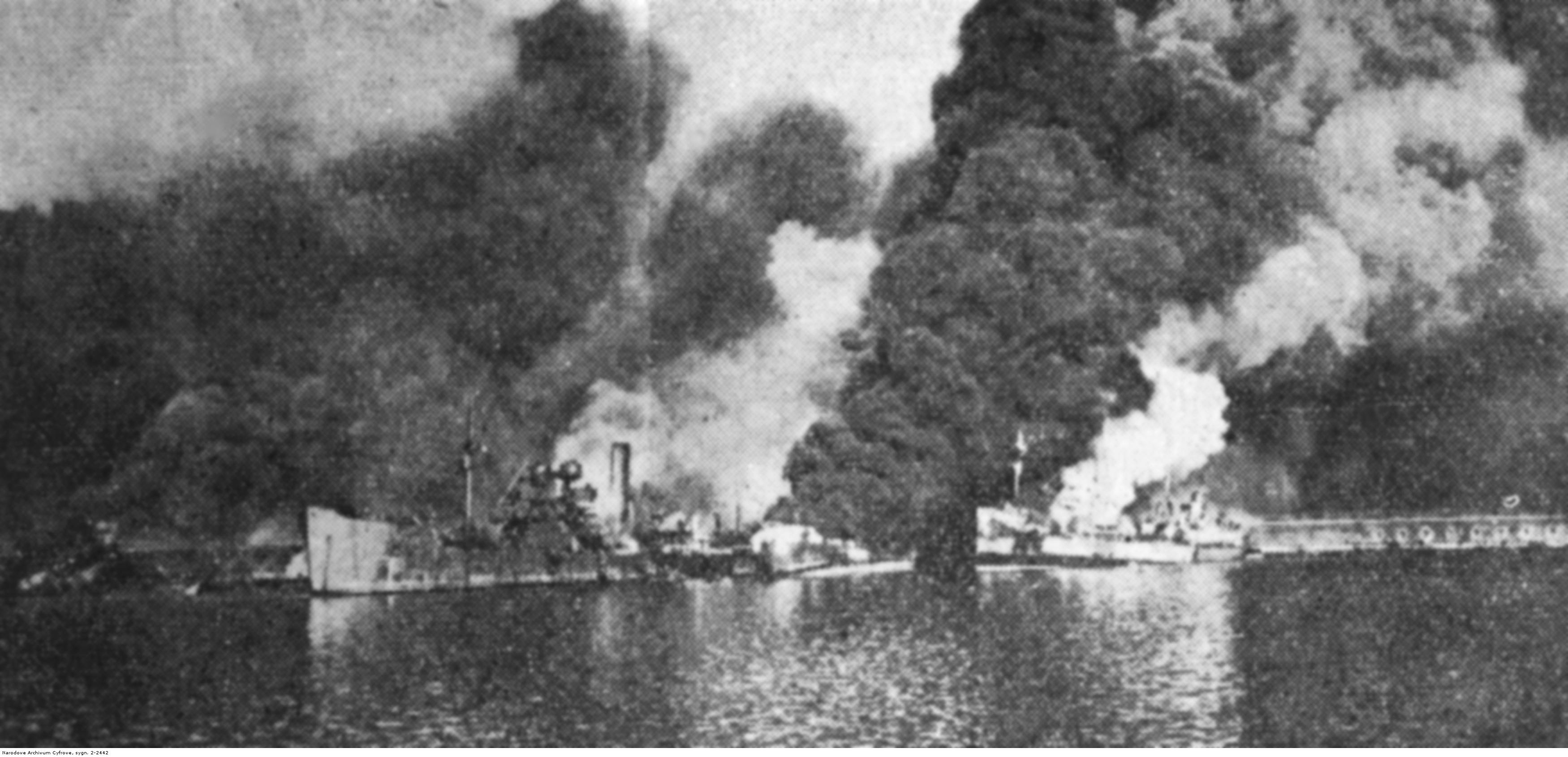 Uderzenie niemieckiego lotnictwa na anglo-amerykańską flotę w Bari. Widoczne płonące okręty.